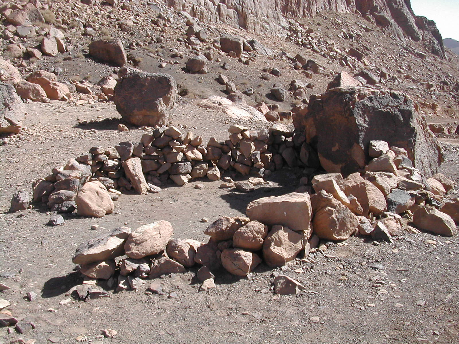 Protection vent Hoggar